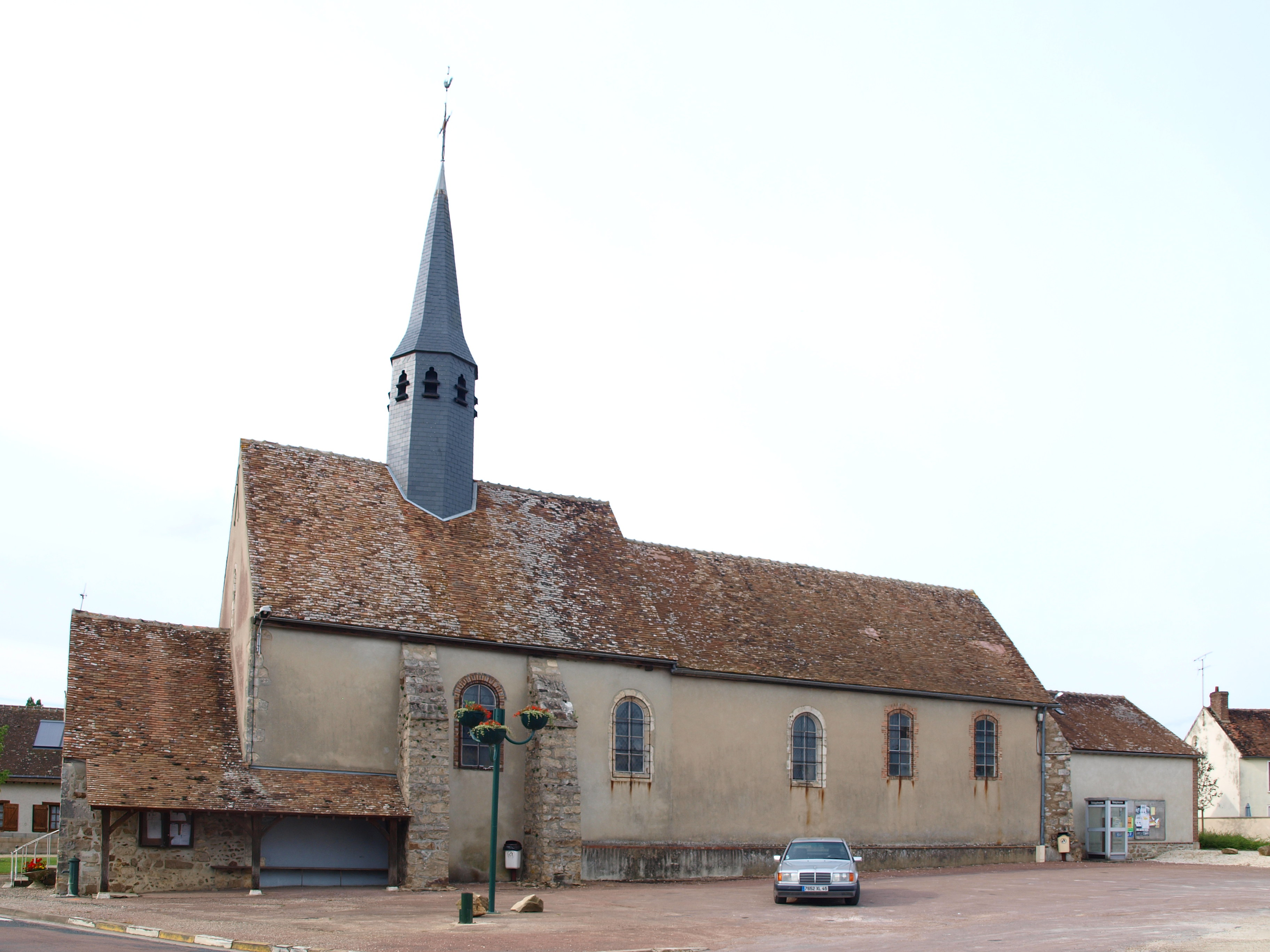 Ervauville (Loiret, France) ; église